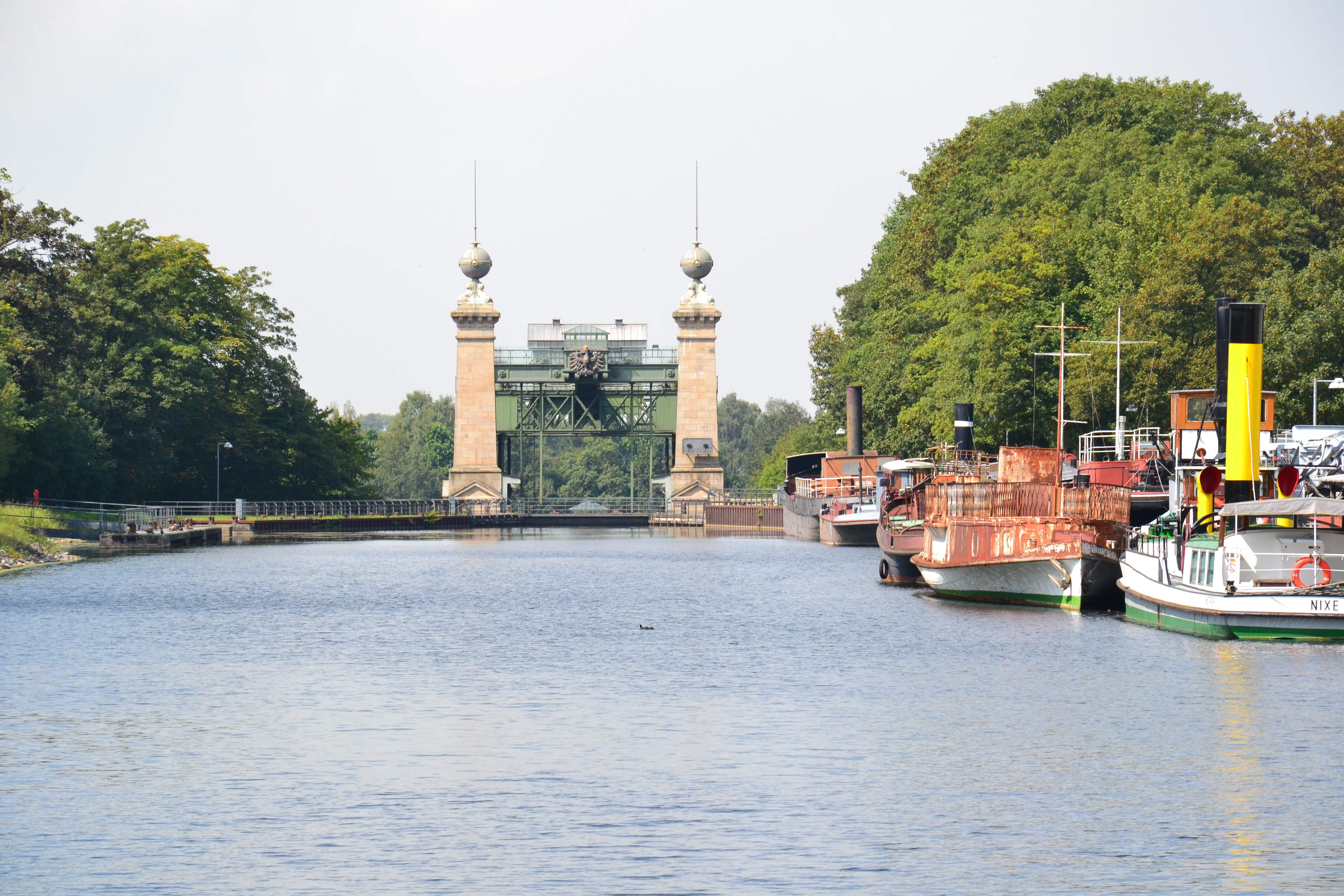 LWL-Industriemuseum Schiffshebewerk Henrichenburg in Waltrop